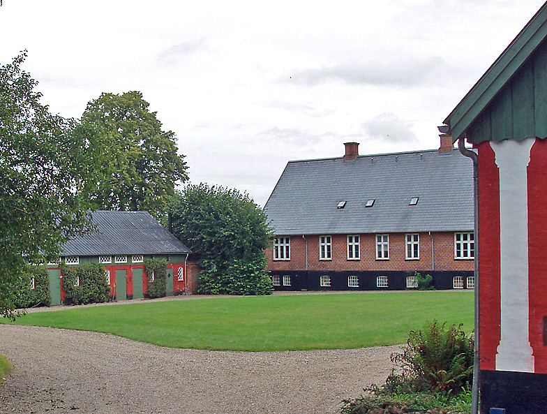 Klostermølle ved Mossø, Vorladegård Sogn, Skanderborg /Århus Amt